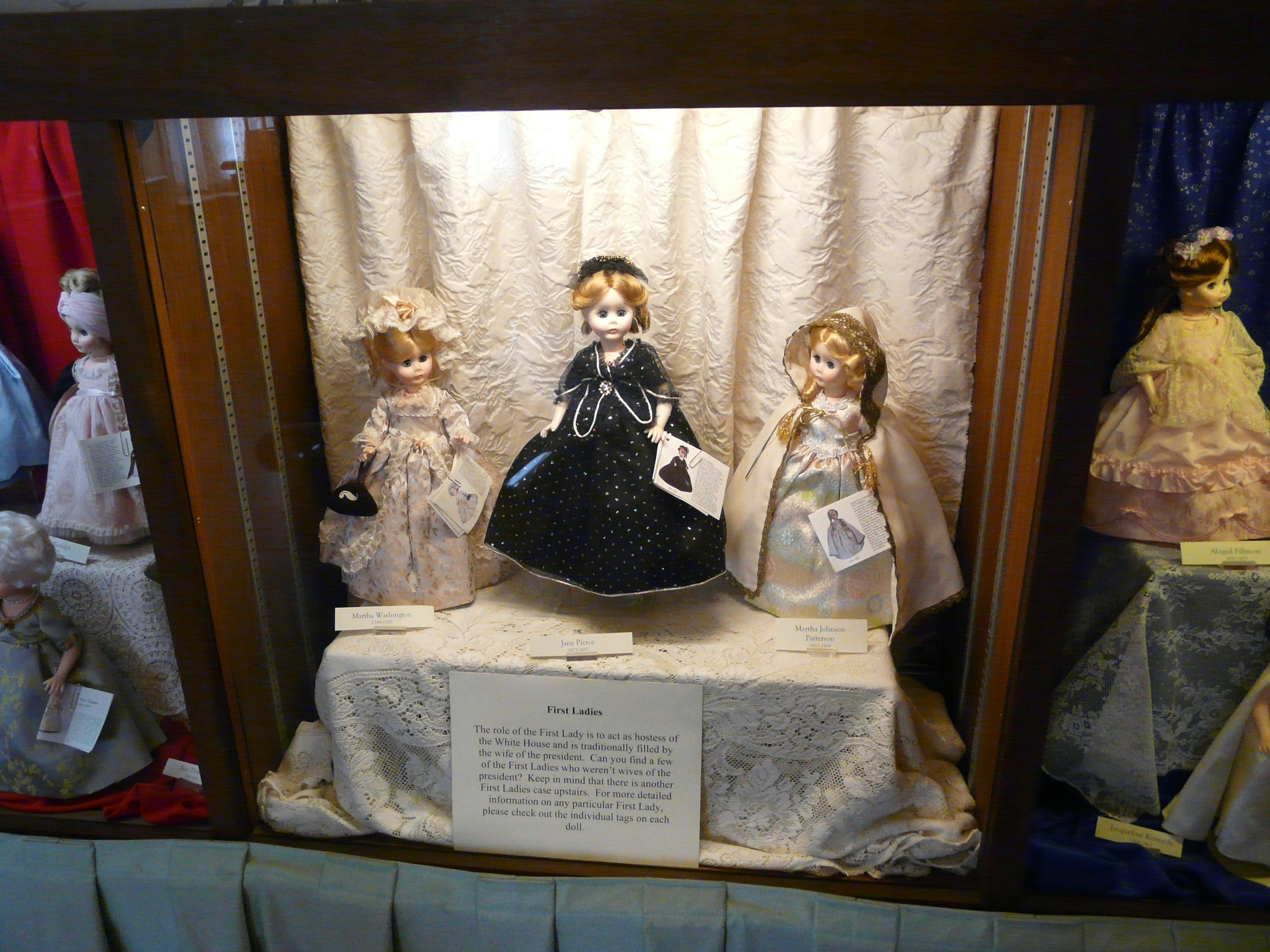 Denver, summer 2012